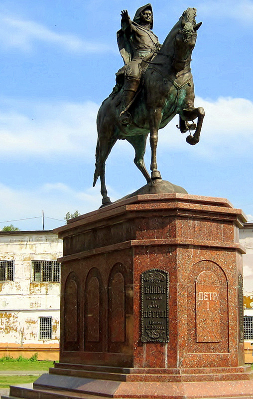 Памятник Петру в Бийске.